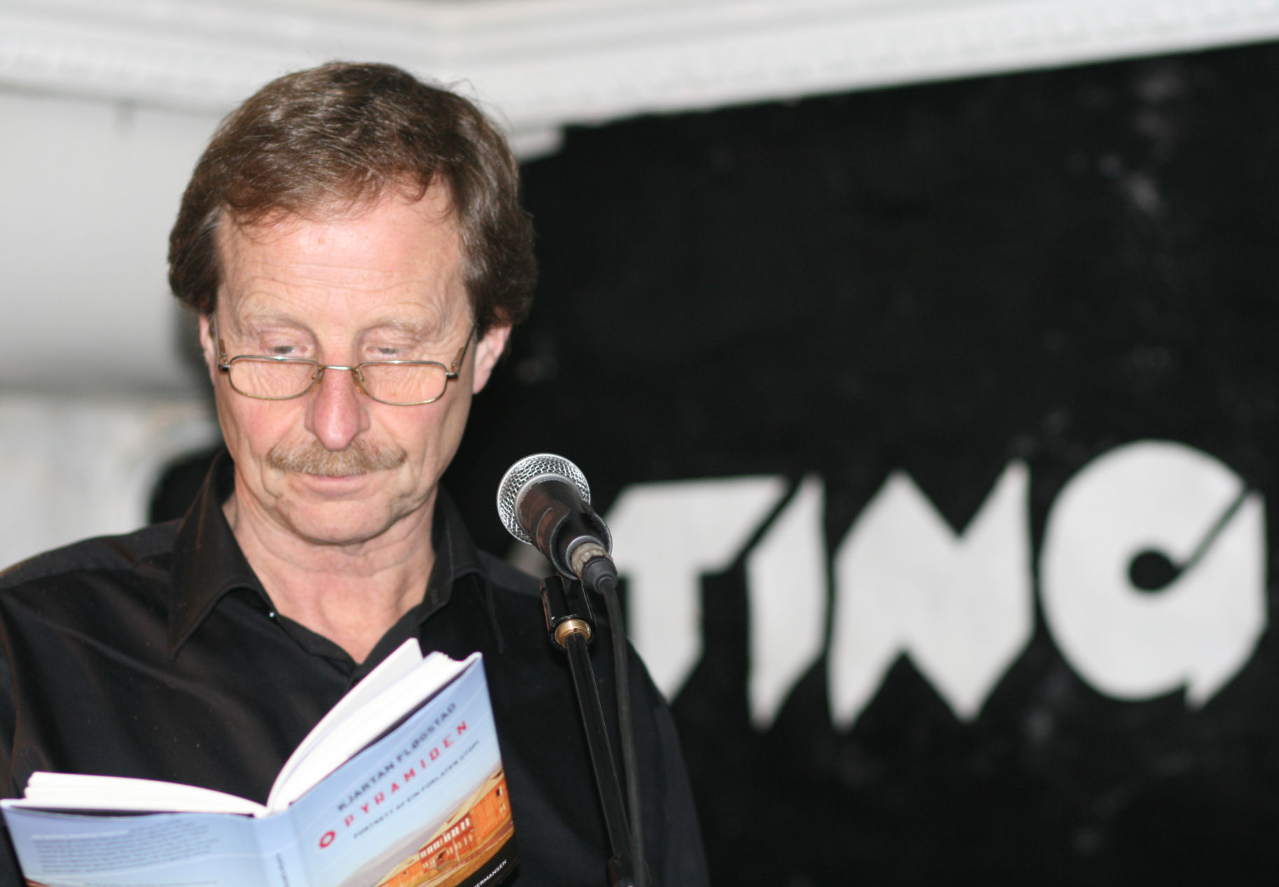 Kjartan Fløgstad at Café Sting November 2007